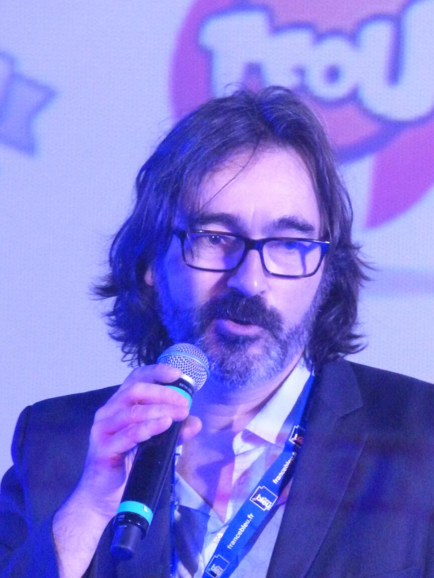 Au festival 'Voix d'Etoiles 2016' de Port Leucate.